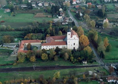 Búcsúszentlászló, Hungary, aerial photography. Szent László római katolikus templom